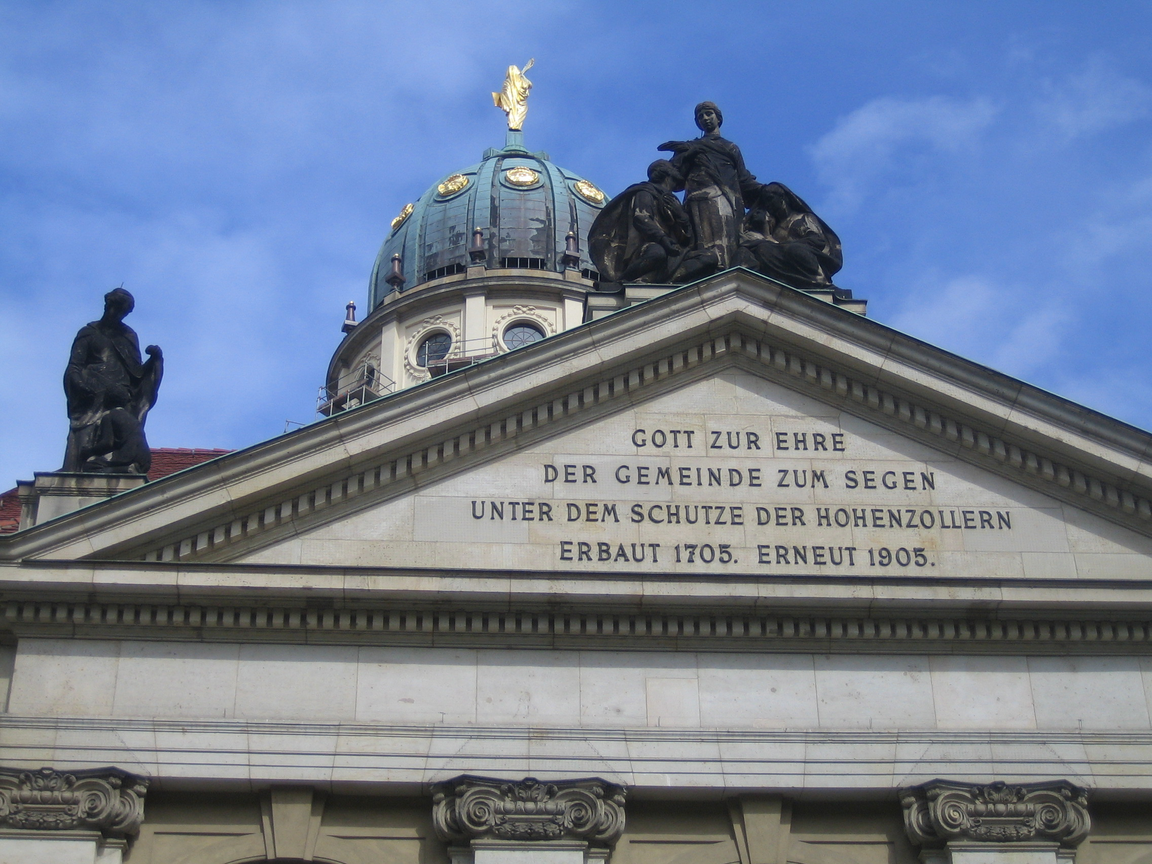 Franzoesische Kirche, (i. e. French Church), detail. Berlin, Gendarmenmarkt.